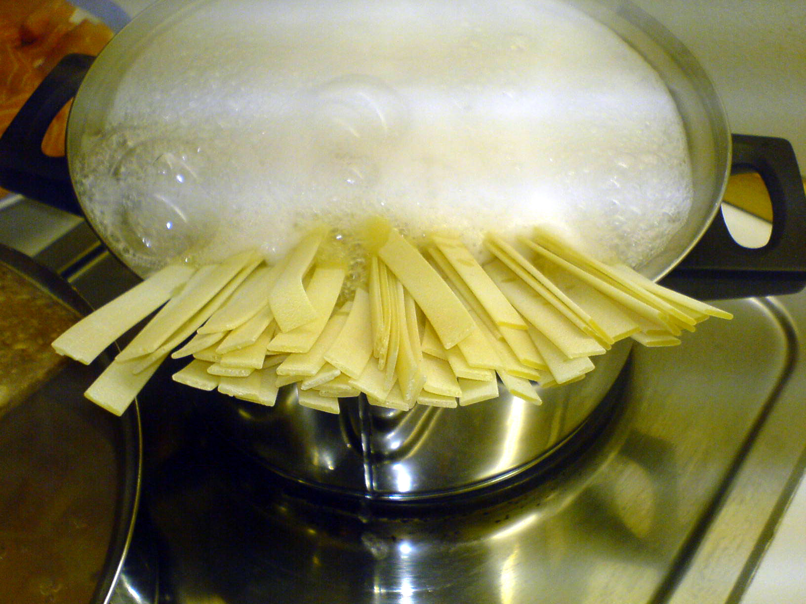 Boiling pasta